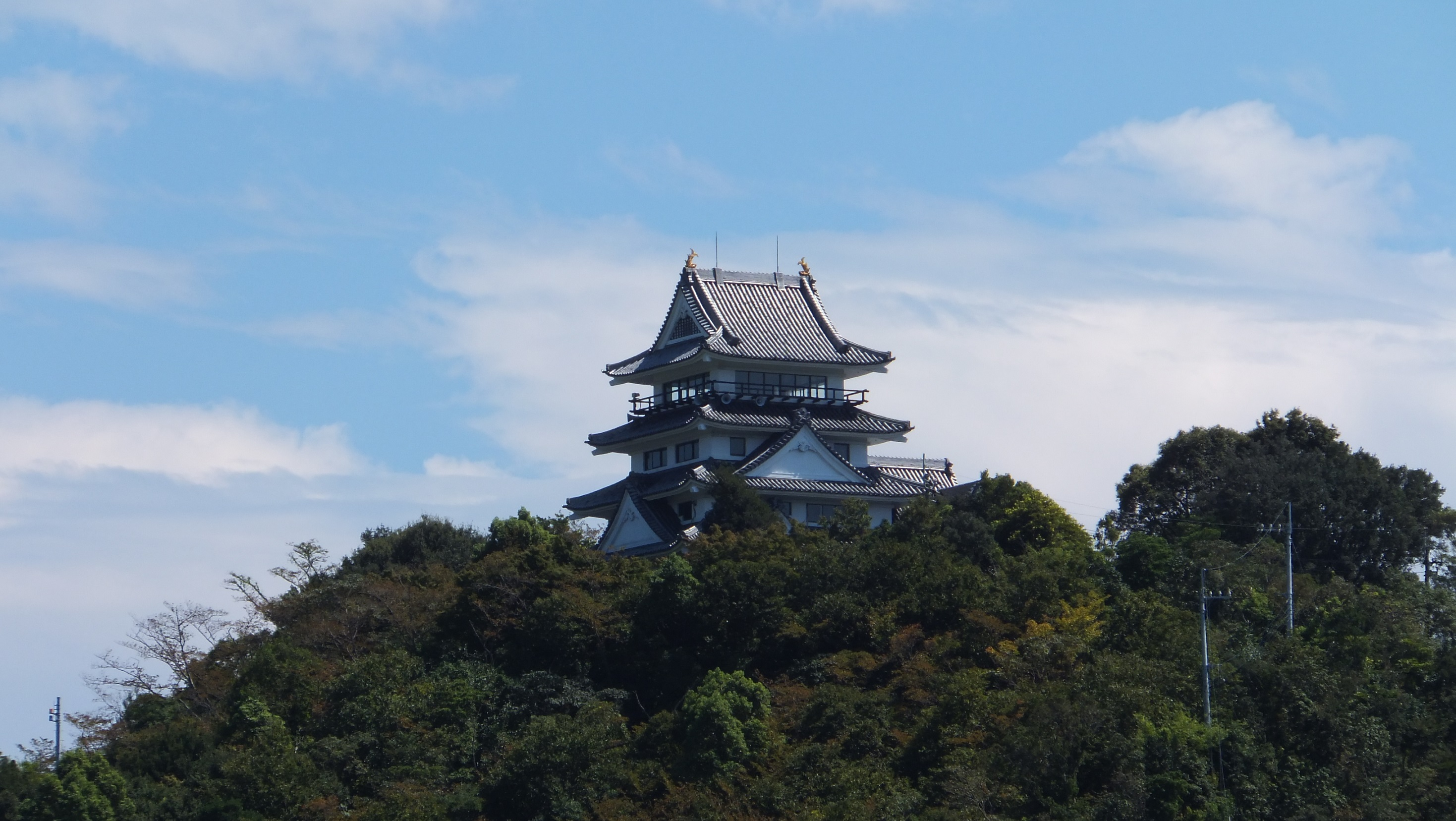 日和佐城模擬天守（徳島県海部郡美波町 JR日和佐駅前より 2015年9月）